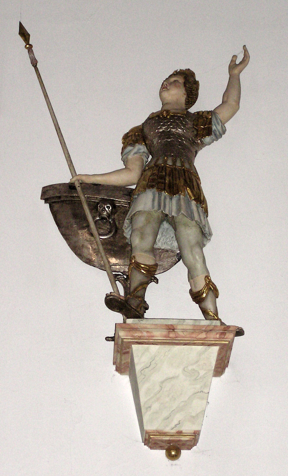 Pfarrkirche St. Vitus in Löningen